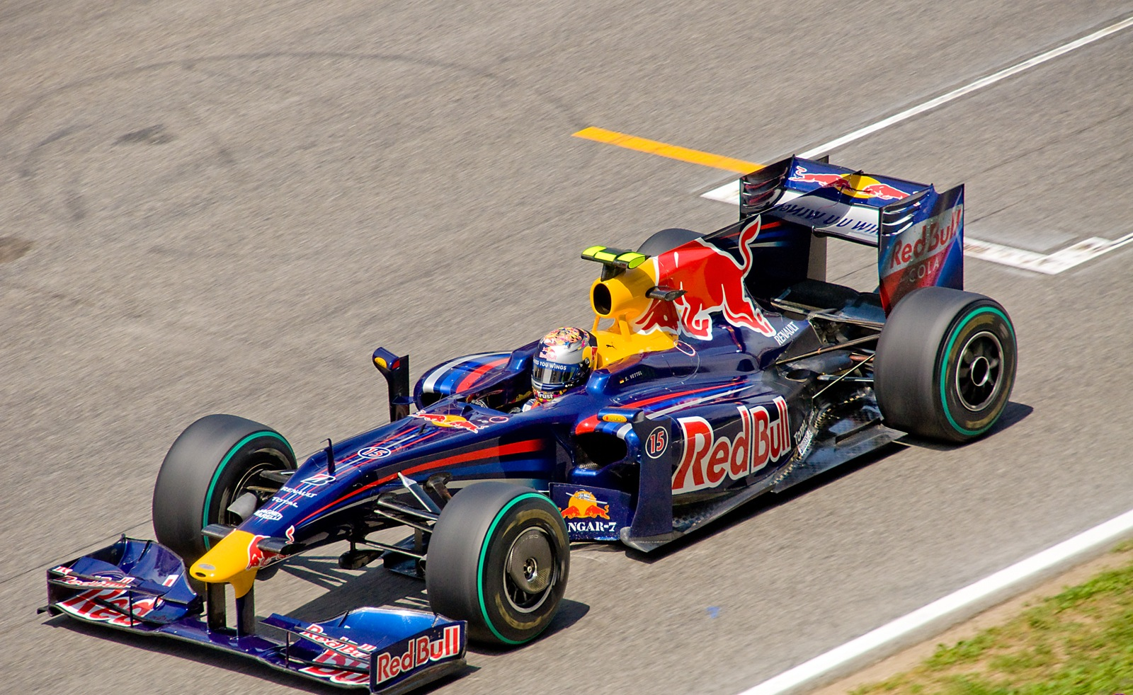 Vettel Spain 2009 Nikon D90 + Sigma 18-200 DC OS HSM 1/1600s - F/10 - 200mm - ISO640